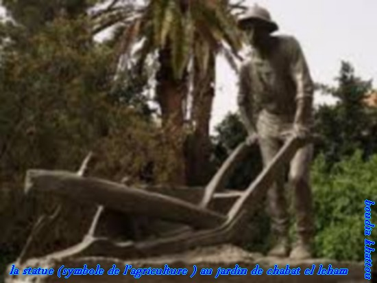 historique